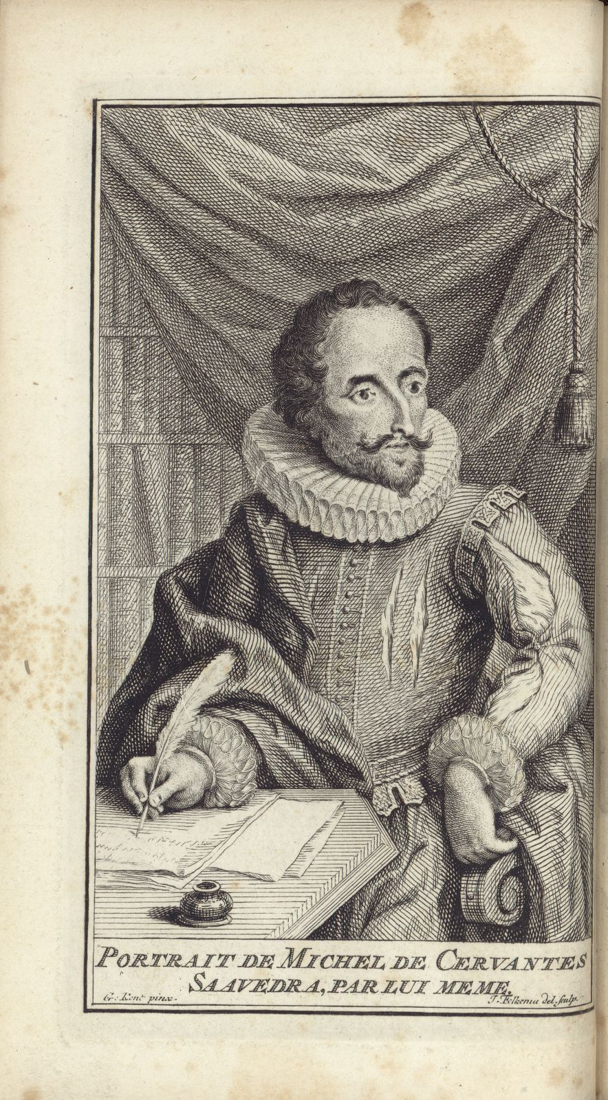 “Portrait de Michel de Cervantes Saavedra par lui meme”, Jacob Folkema, Amsterdam, 1768. Primera impresión con las “Novelas Ejemplares” de 1739.